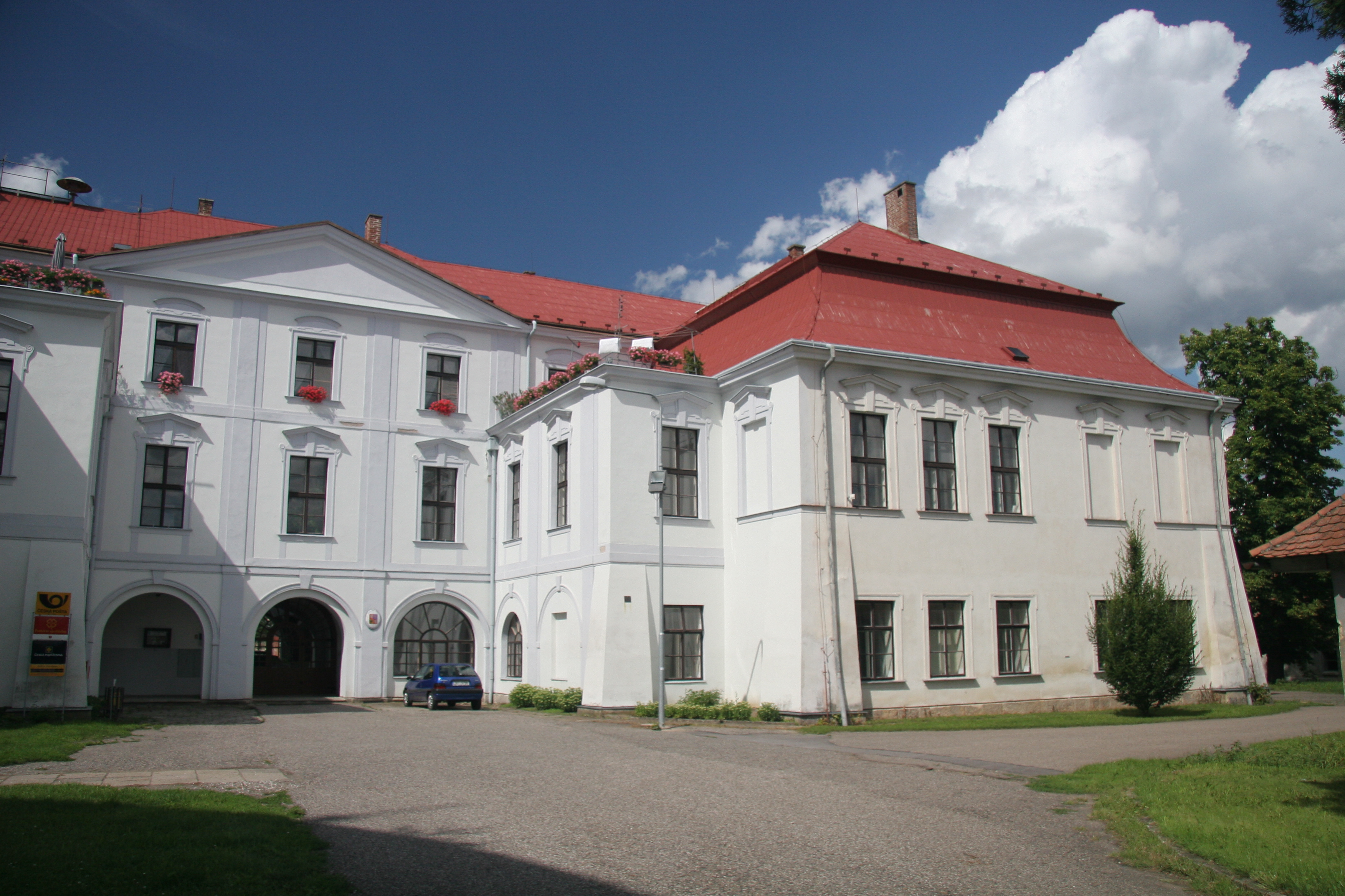 Zámek Cerekvice nad Bystřicí, Cerekvice nad Bystřicí 1